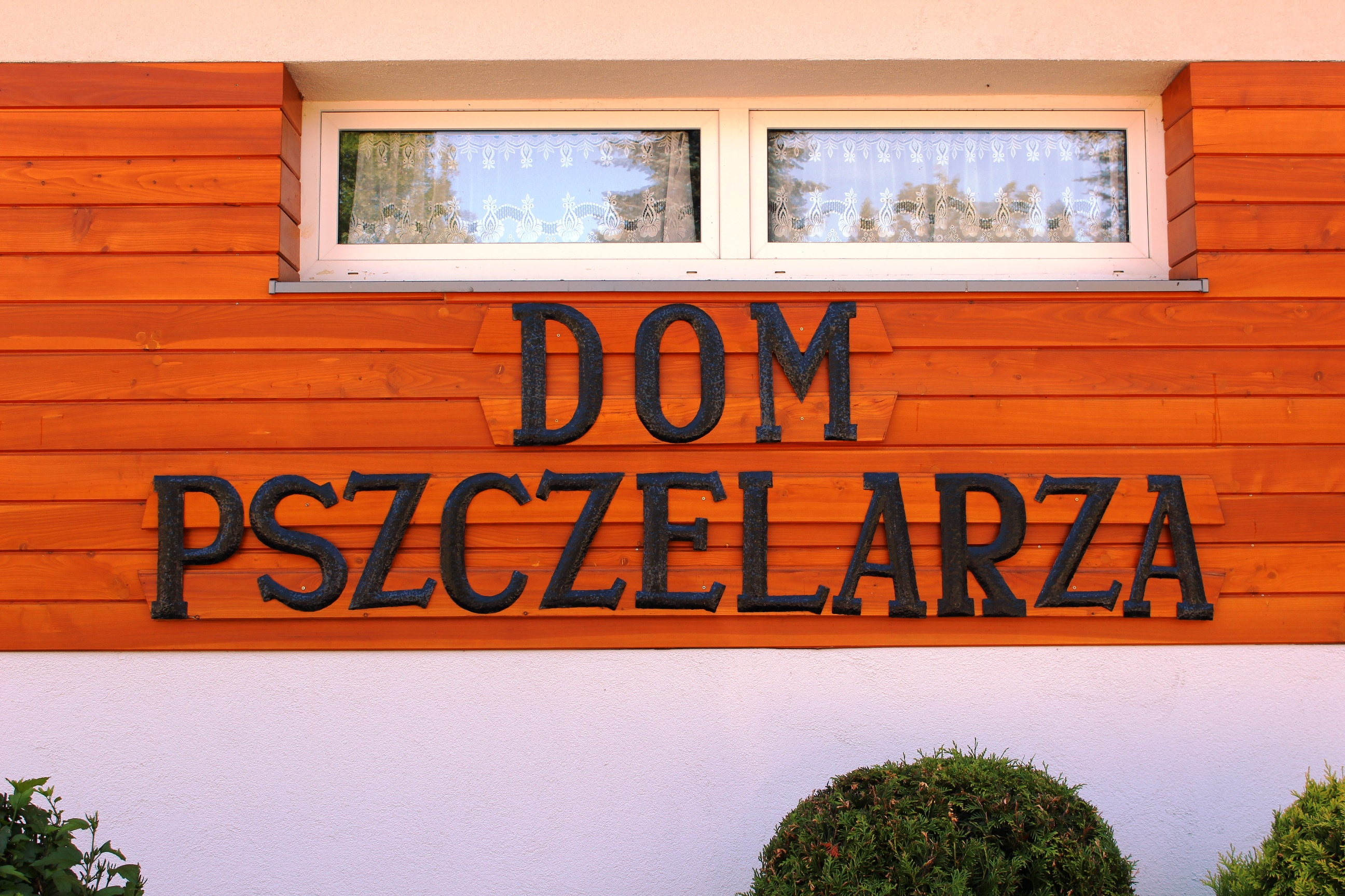 Kamianna